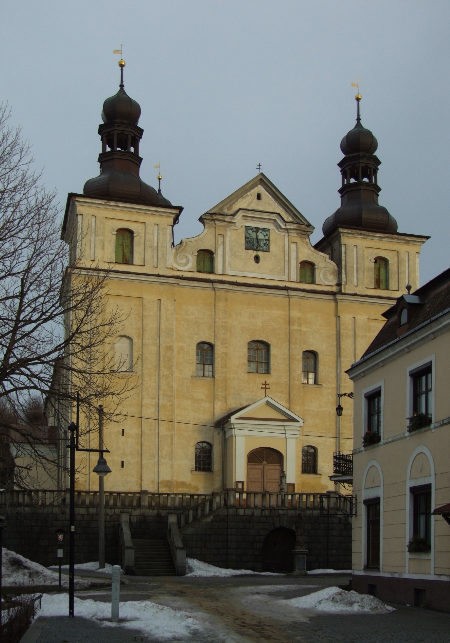 Zlaté Hory - farní kostel Nanebevzetí Panny Marie